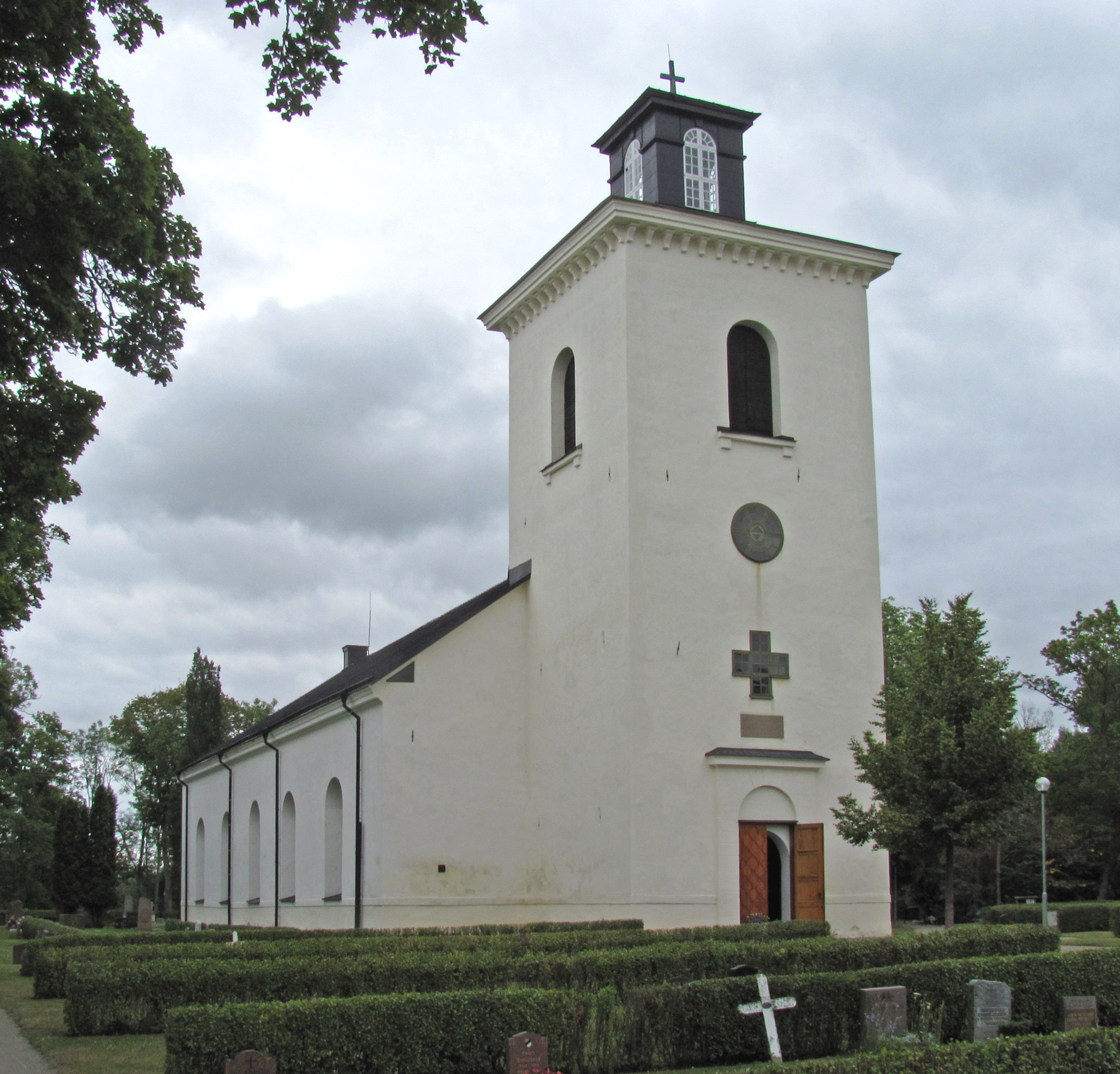 Rytterne kyrka